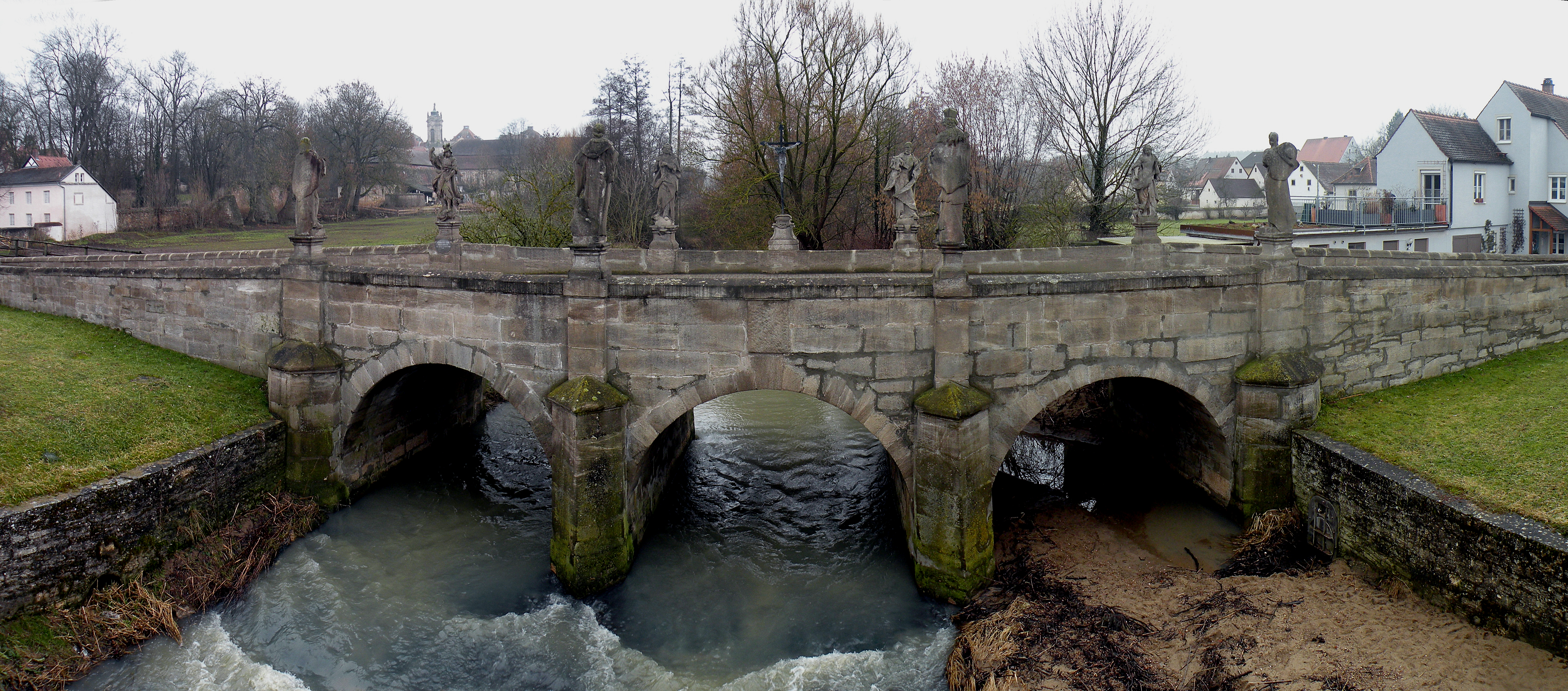 Эллинген.Мост через Рецат